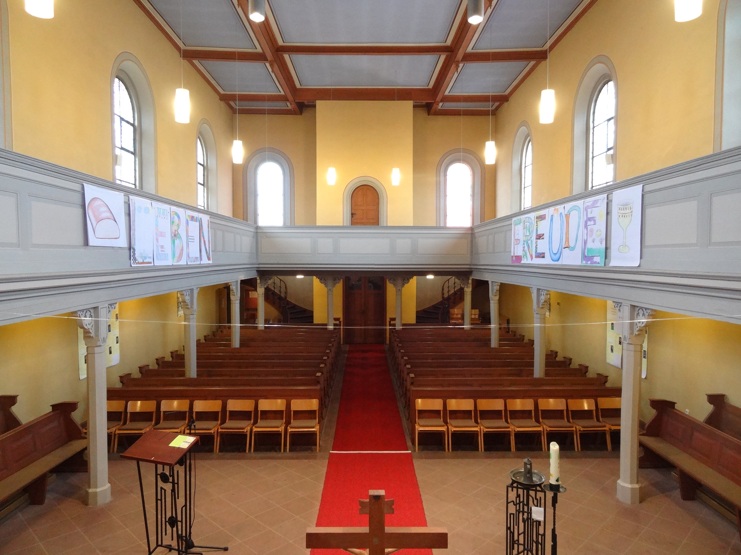 Evangelische Kirche (Kleinlinden)